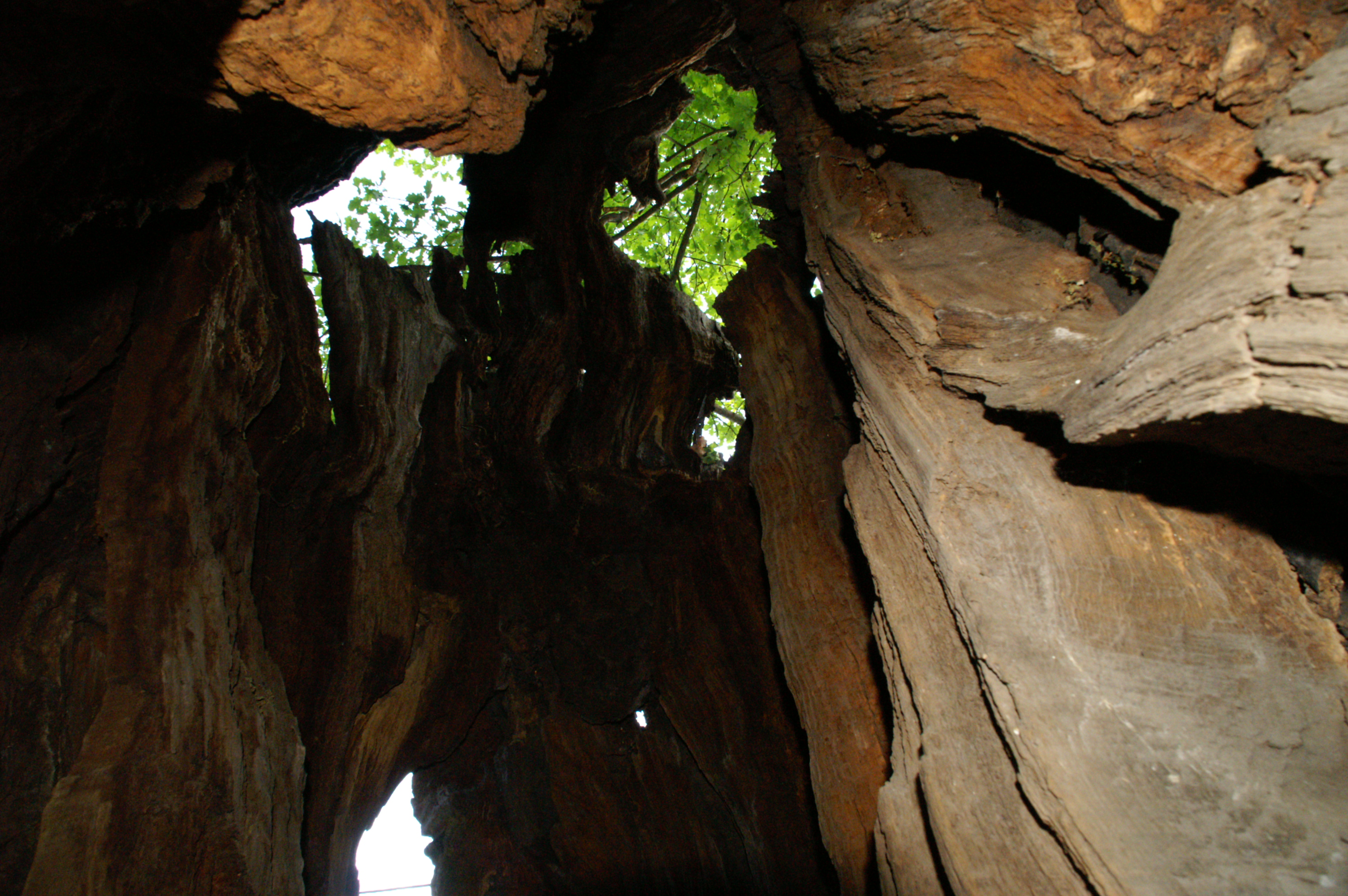 Oak in Noebdenitz, Germany